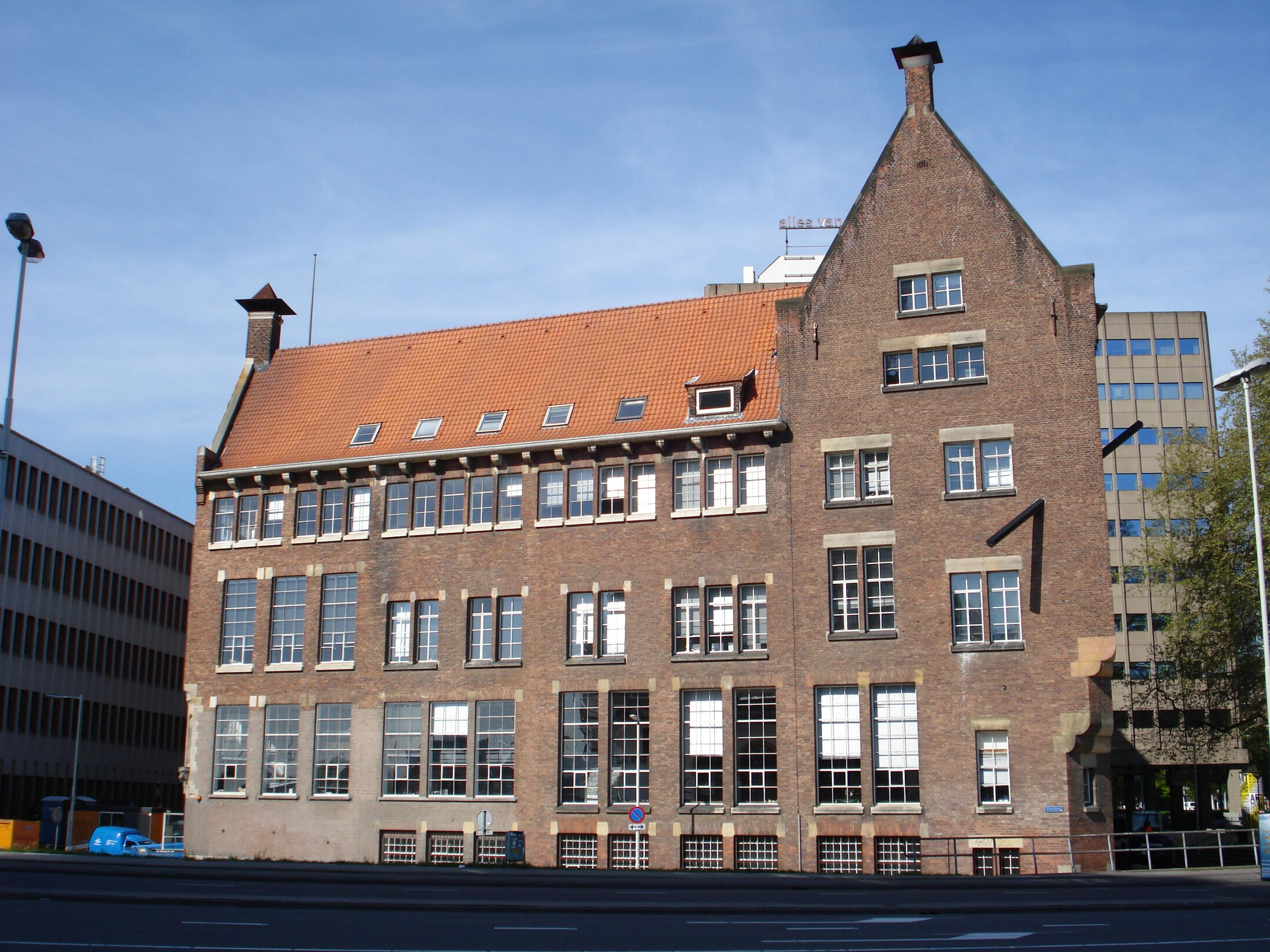 Rotterdam, Blaak 10. Rijksmonument.